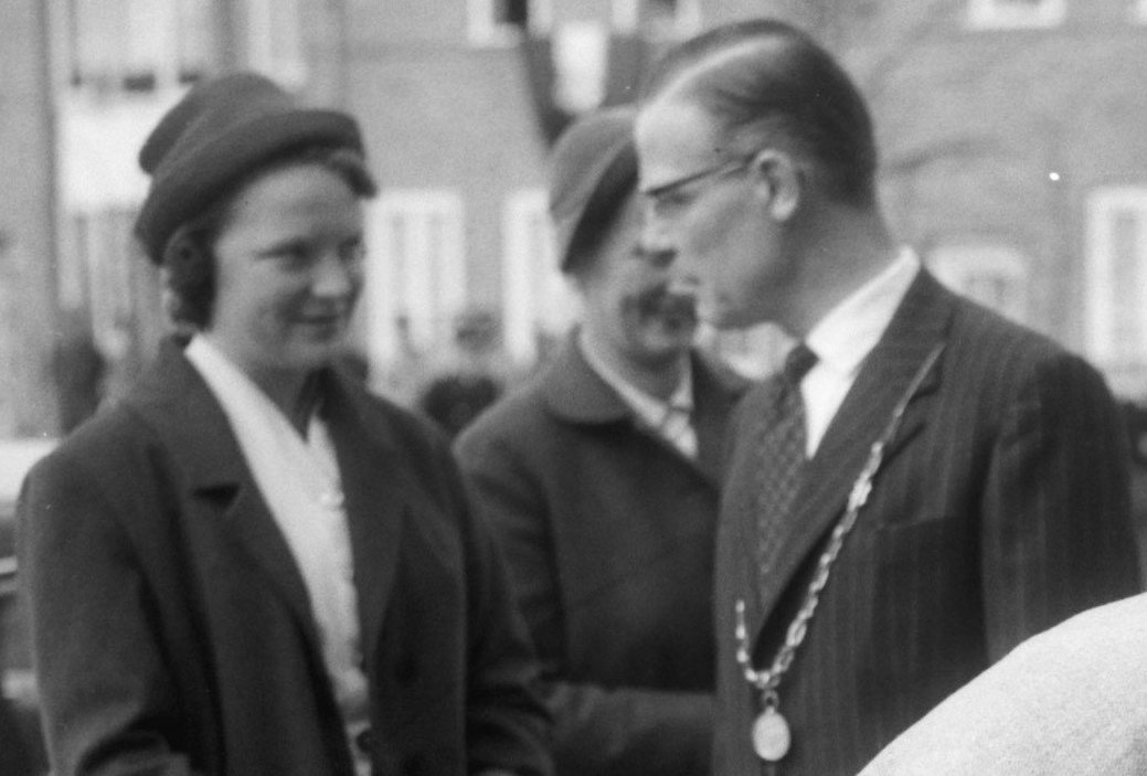 Collectie / Archief : Fotocollectie Anefo Reportage / Serie : [ onbekend ] Beschrijving : Annemieke Arnouds, 7 jaar, biedt bloemen aan koningin Juliana aan Annotatie : Werkbezoek van koningin Juliana en prinses Irene (midden) aan West-brabant Datum : 29 maart 1958 Trefwoorden : bloemen, burgemeesters, koninginnen Persoonsnaam : Arnouds, Annemieke, Juliana (koningin Nederland) Fotograaf : Pot, Harry / Anefo Auteursrechthebbende : Nationaal Archief Materiaalsoort : Negatief (zwart/wit) Nummer archiefinventaris : bekijk toegang 2.24.01.04 Bestanddeelnummer : 909-4508